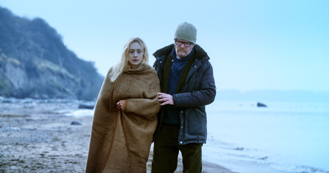 Filmstill aus „Colonna“ Copyright: Peter Polsak, moonfilm GmbH